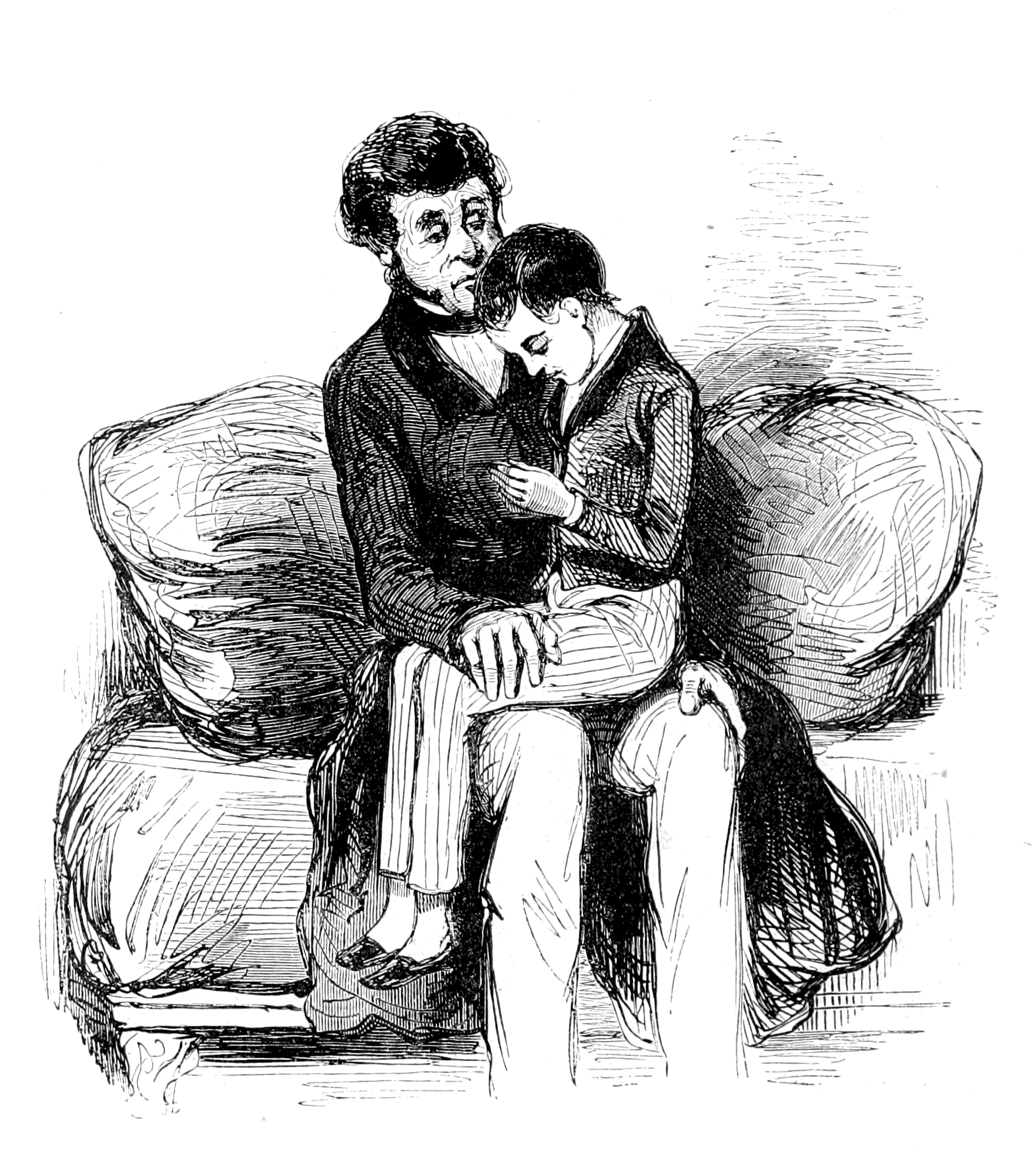 Les Enfants terribles - 19 - d349 - Est-ce que c’est vrai Mosieu d’Alby, que tu couperais des liards en quatre ?